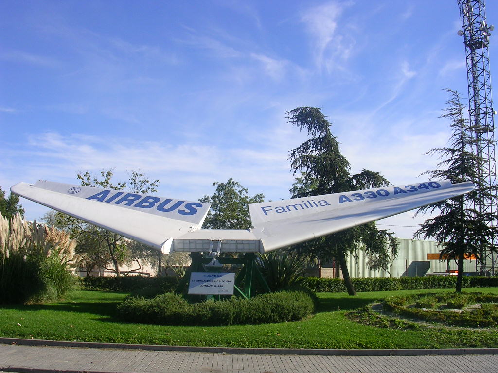 Estabilizador horizontal de Airbus A330 y A340 expuesto en la entrada de Getafe, cerca de la fábrica de Airbus allí.